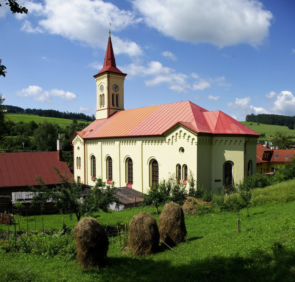 Evangelický kostel v Růžďce na Vsetínsku (Morava, Česká republika)